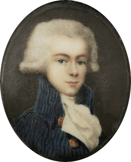 Беларуская (тарашкевіца): Партрэт Ігнація Патоцкага (Ihnaci Patocki)Portrait of Ignacy Potocki (1750-1809)